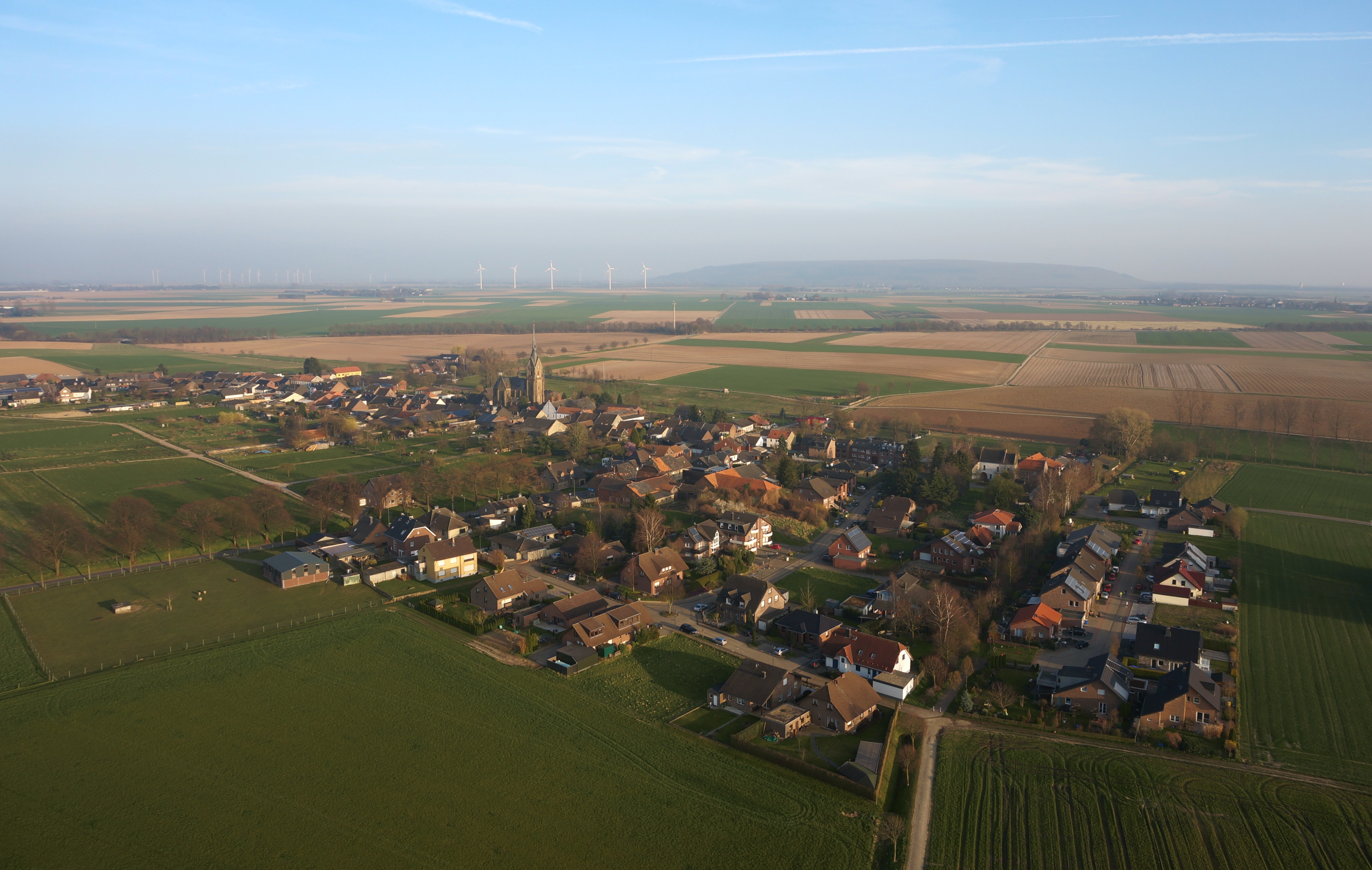 Luftbild Dorf Müntz